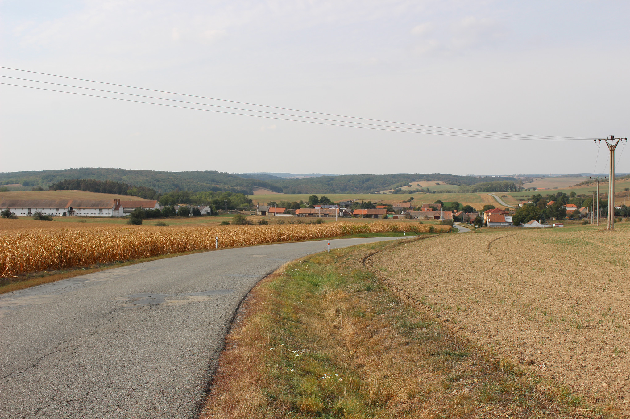 Rudlice, okres Znojmo, Jihomoravský kraj, pohled na obec od silnice č. 399 (od VJV)